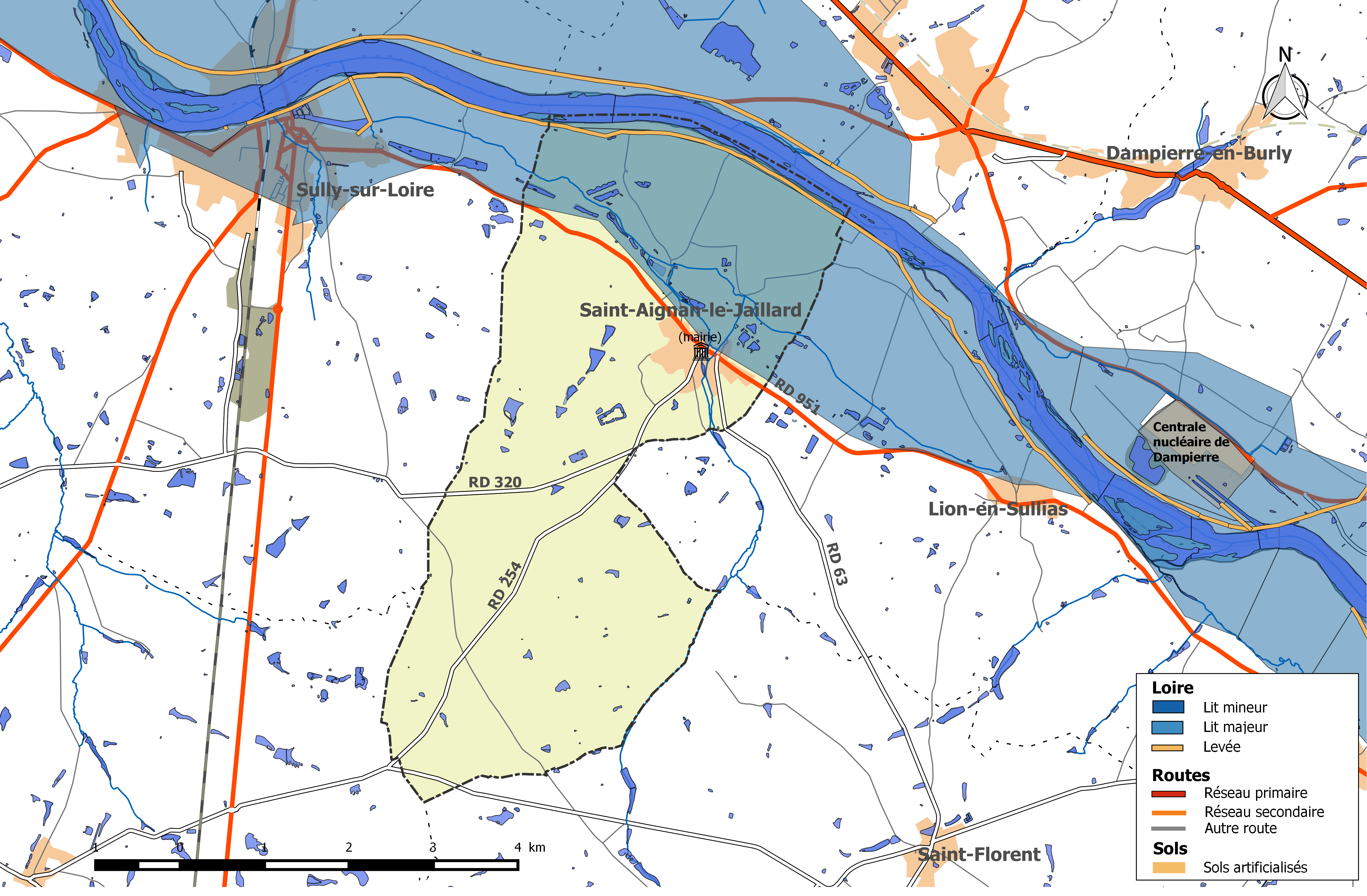 Zone inondable et réseaux hydrographique et routier de la commune de Saint-Aignan-le-Jaillard.